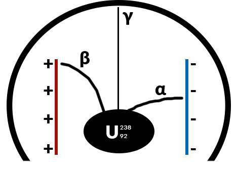 Так умовно виглядав дослід радіоактивності